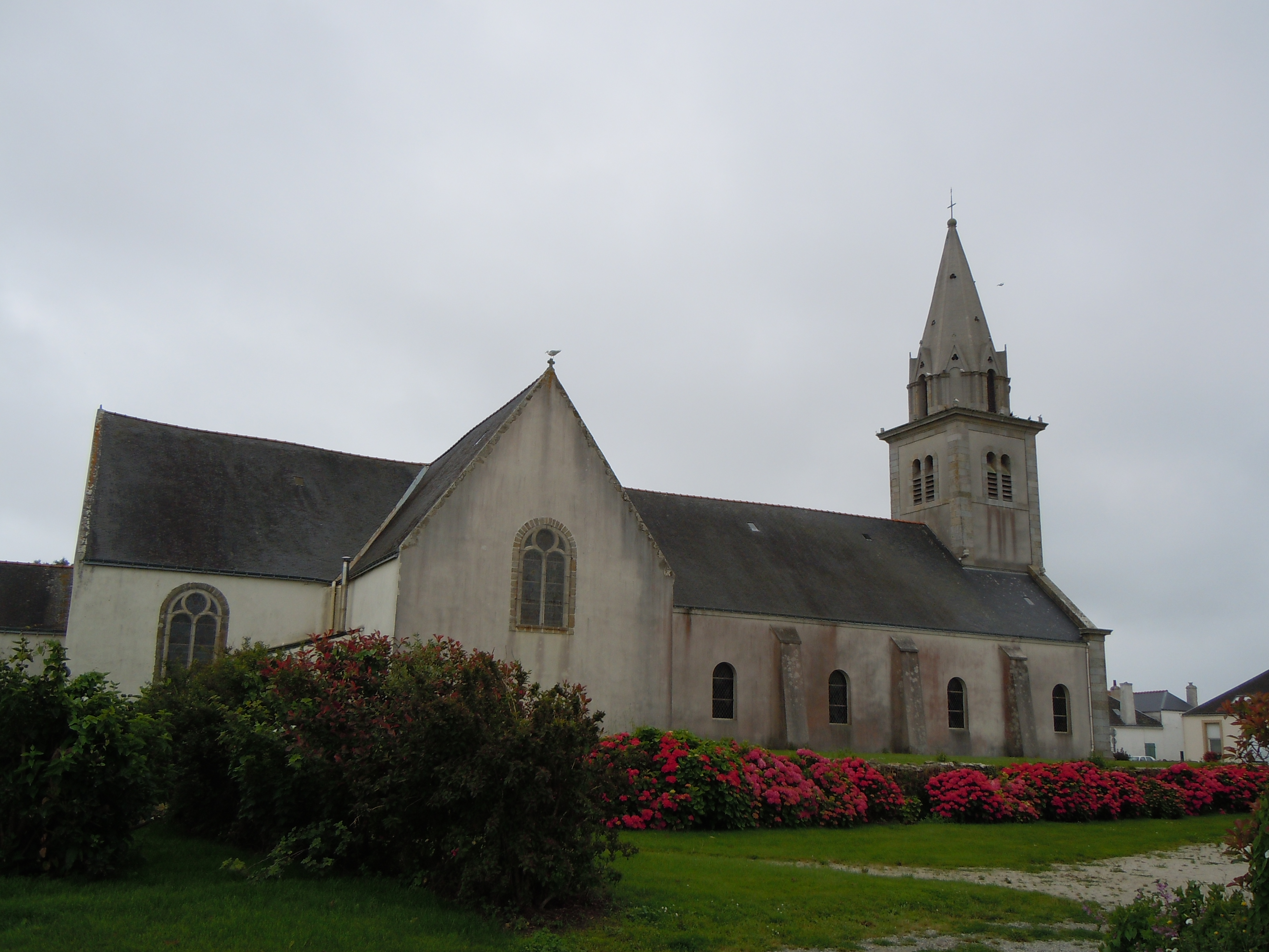 Église de Bangor, Morbihan